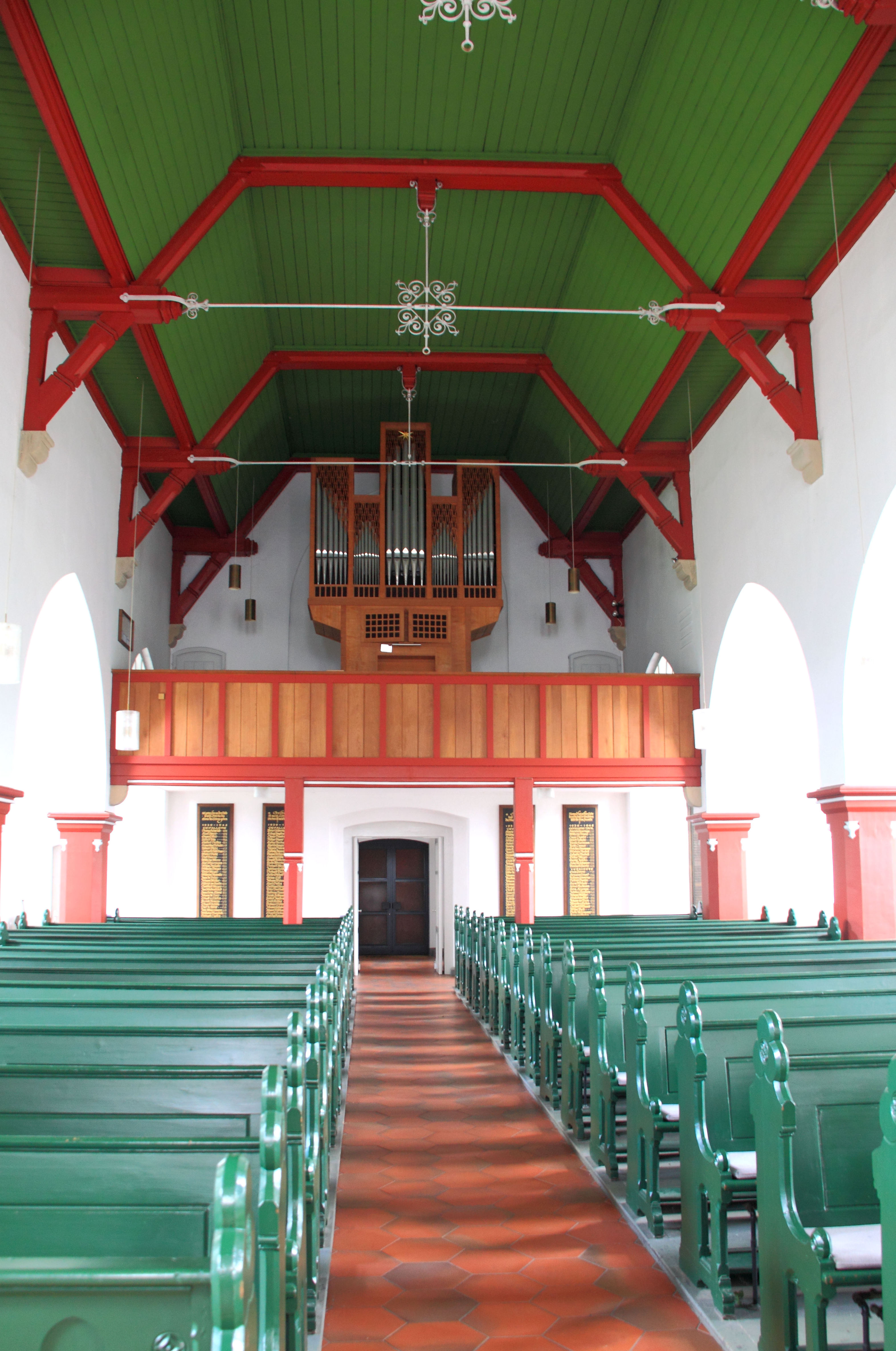 Inneneinrichtung der Friedenskirche in Leer-Loga